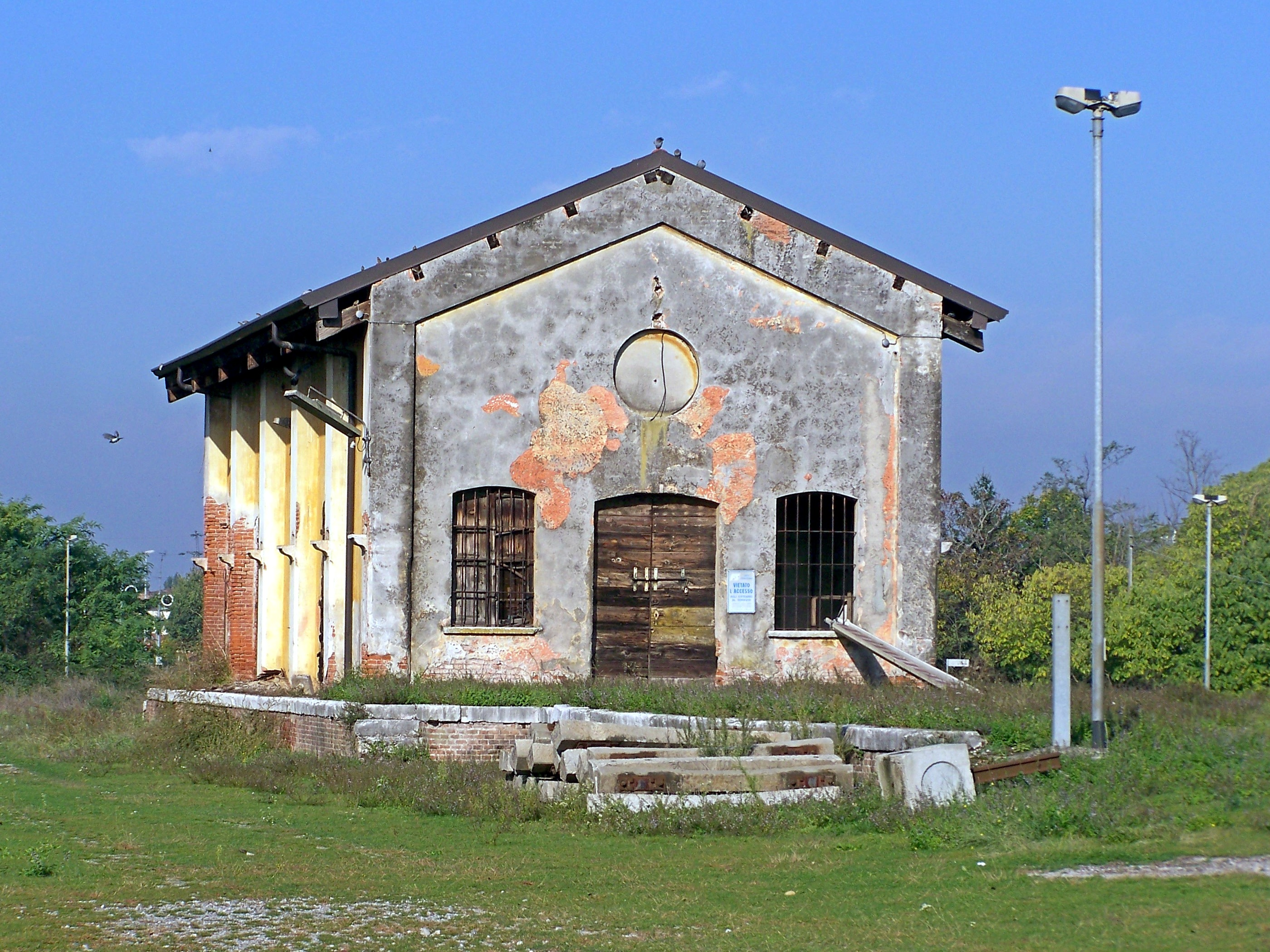 Il Magazzino Merci della stazione di Ghedi